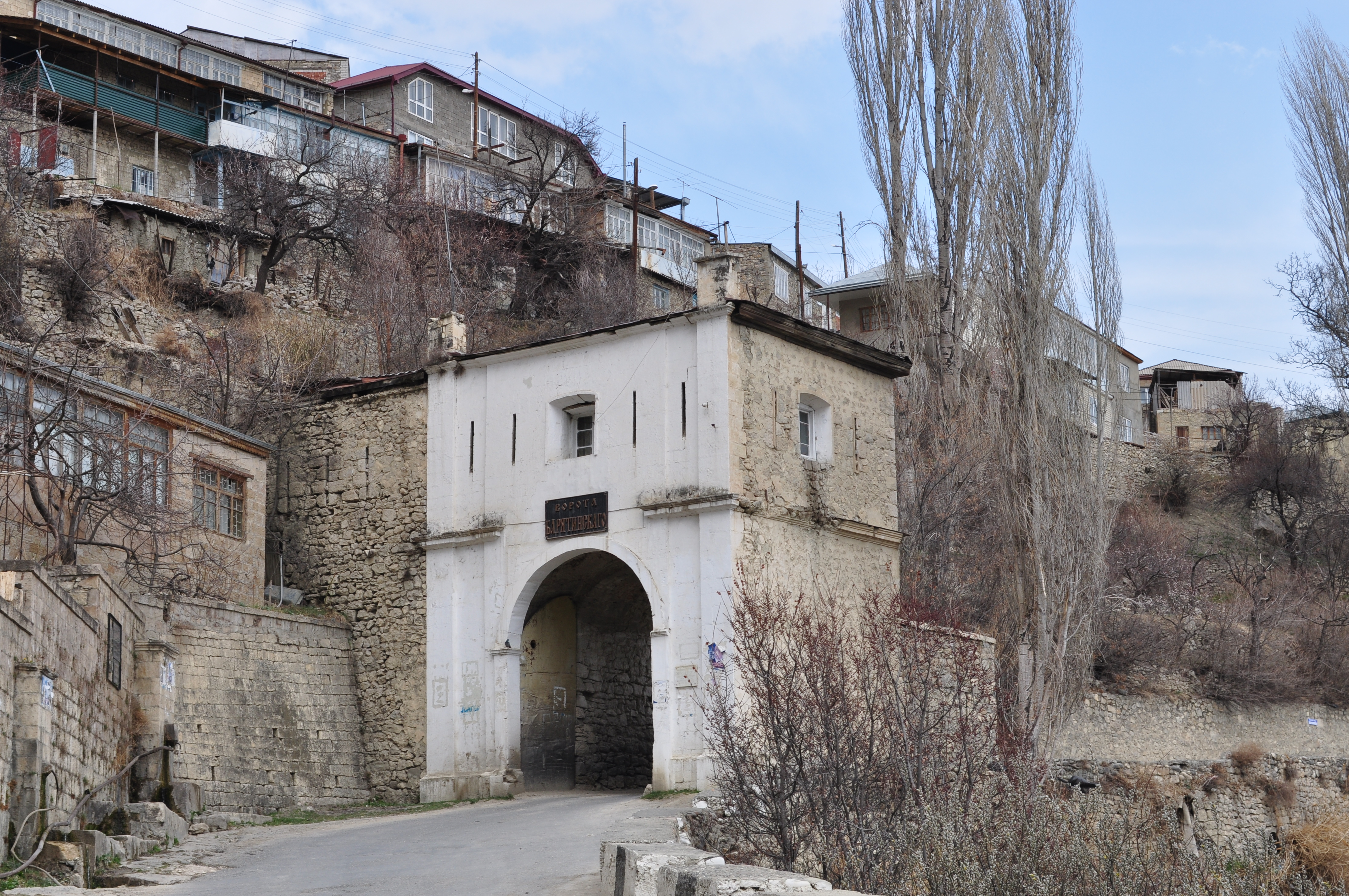 Нижние ворота Гунибской крепости (ворота Барятинского). Аул Гуниб, Дагестан. Постройка 1867 года.